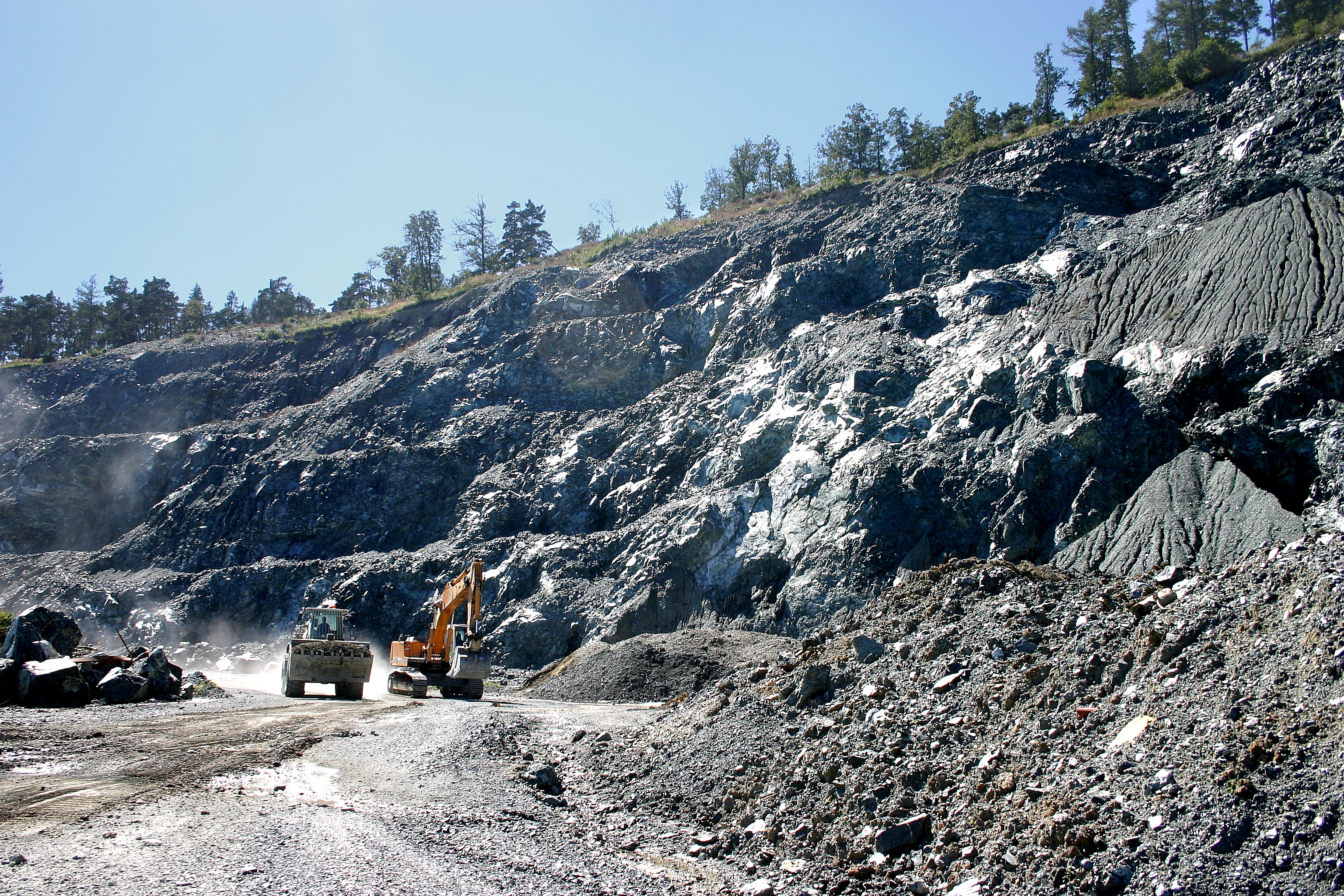 Bernstein im Burgenland Steinbruch, wo auch Edelserpentin gefunden wird